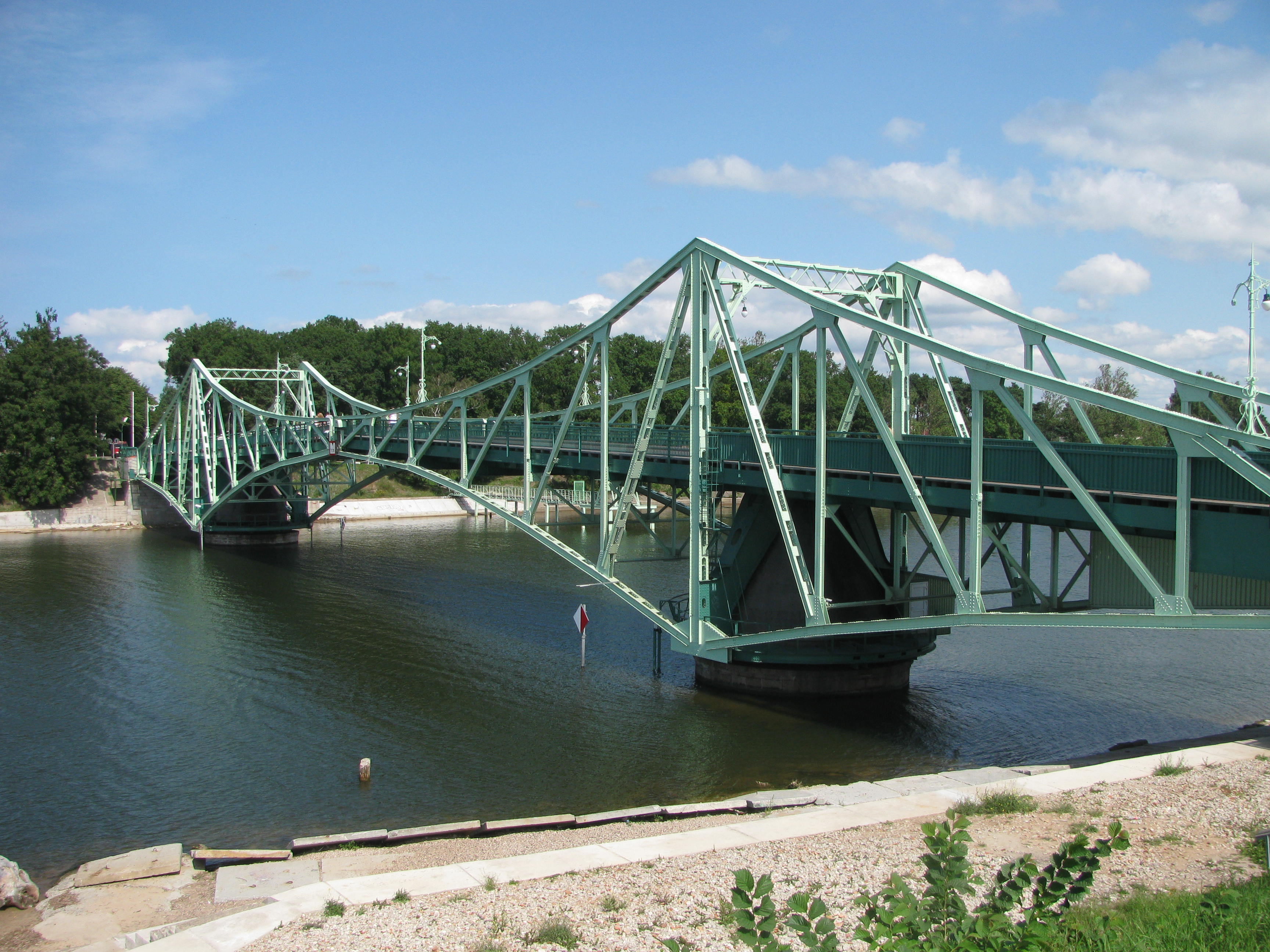 Dvojitý otočný most Oskara Kalpaka spojující bývalý vojenský přístav Karosta (vzdálenější konec) se Severním předměstím, Liepāja, Lotyšsko.